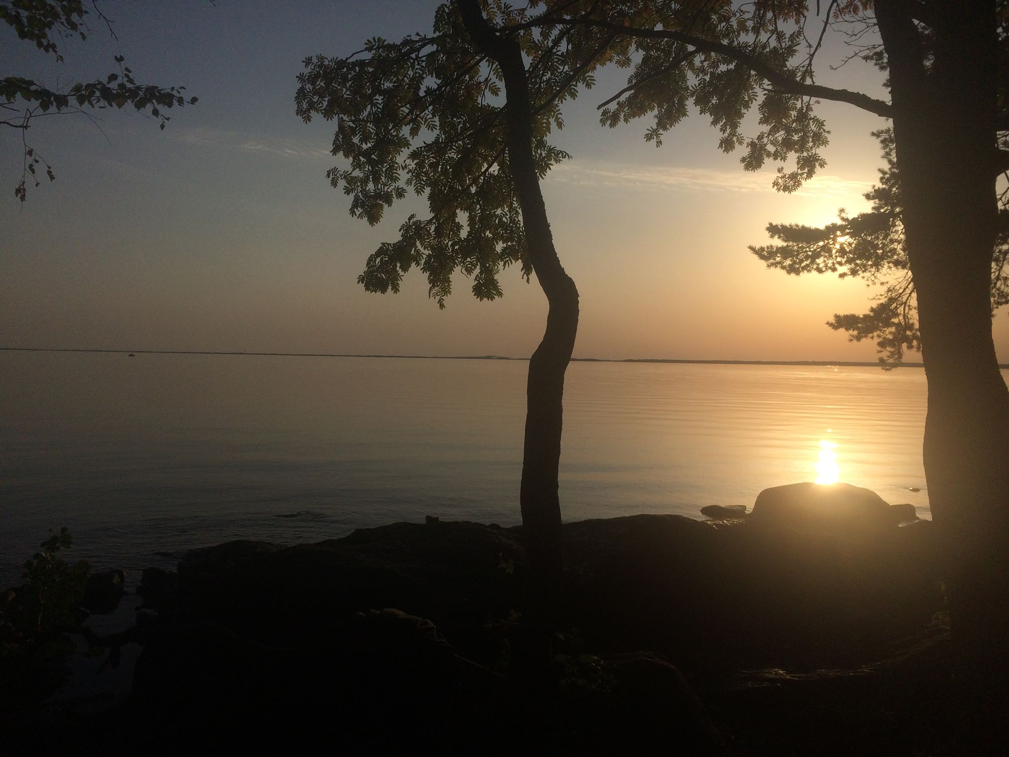 Закат на полуострове Кухасало